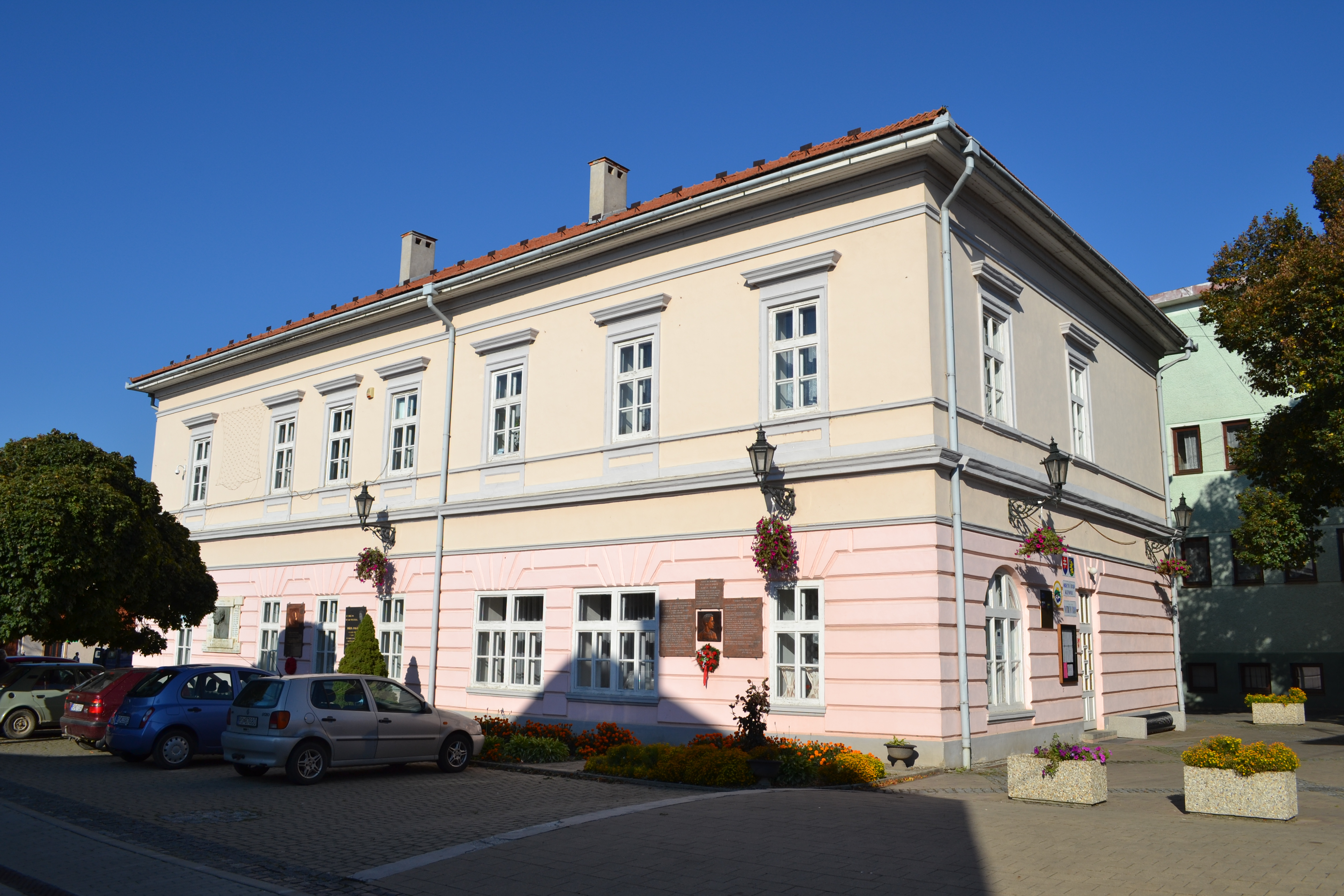 Pamätný dom na námestí Karola Salvu č.1